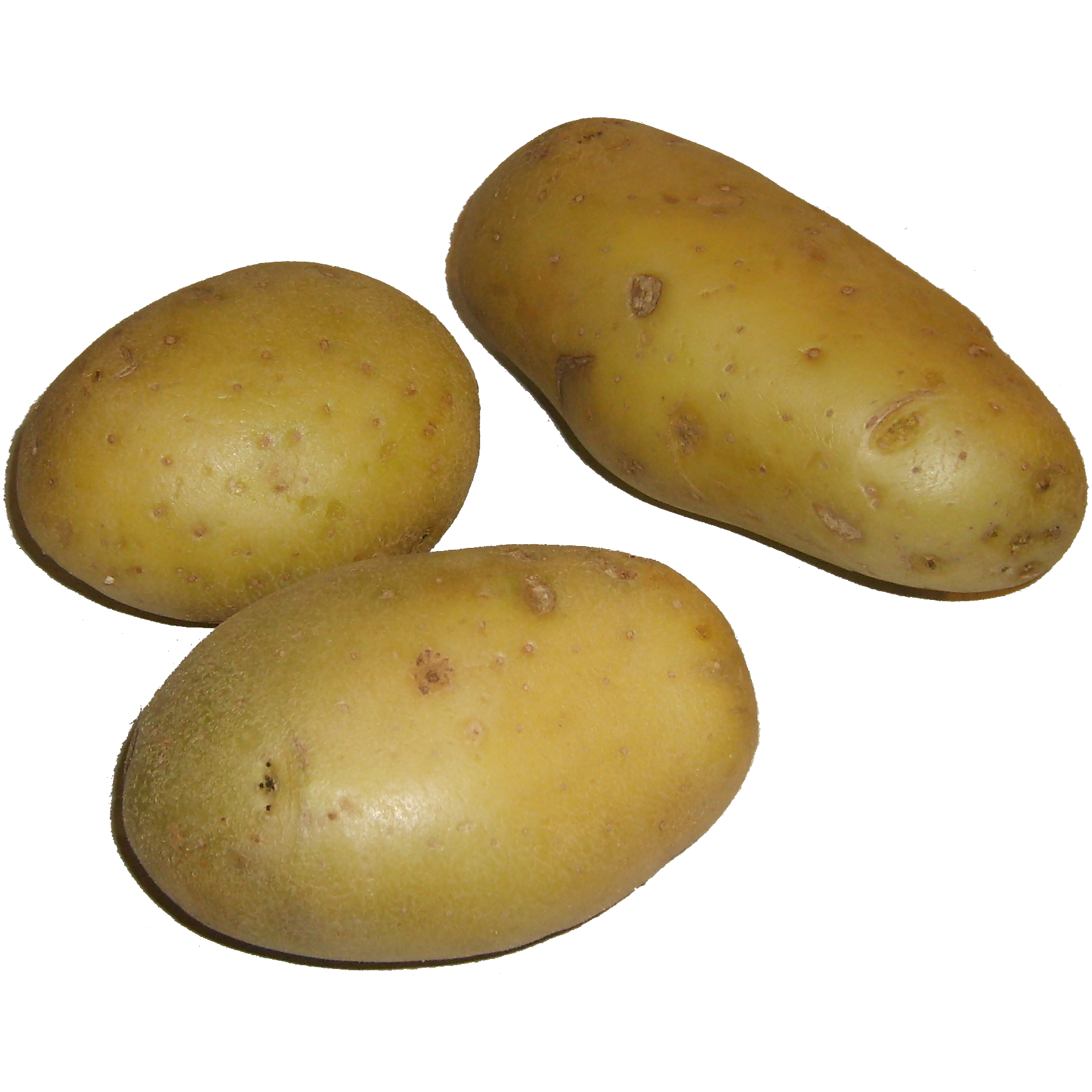 3 pommes de terre, détouréesUnknown 3 patatoes